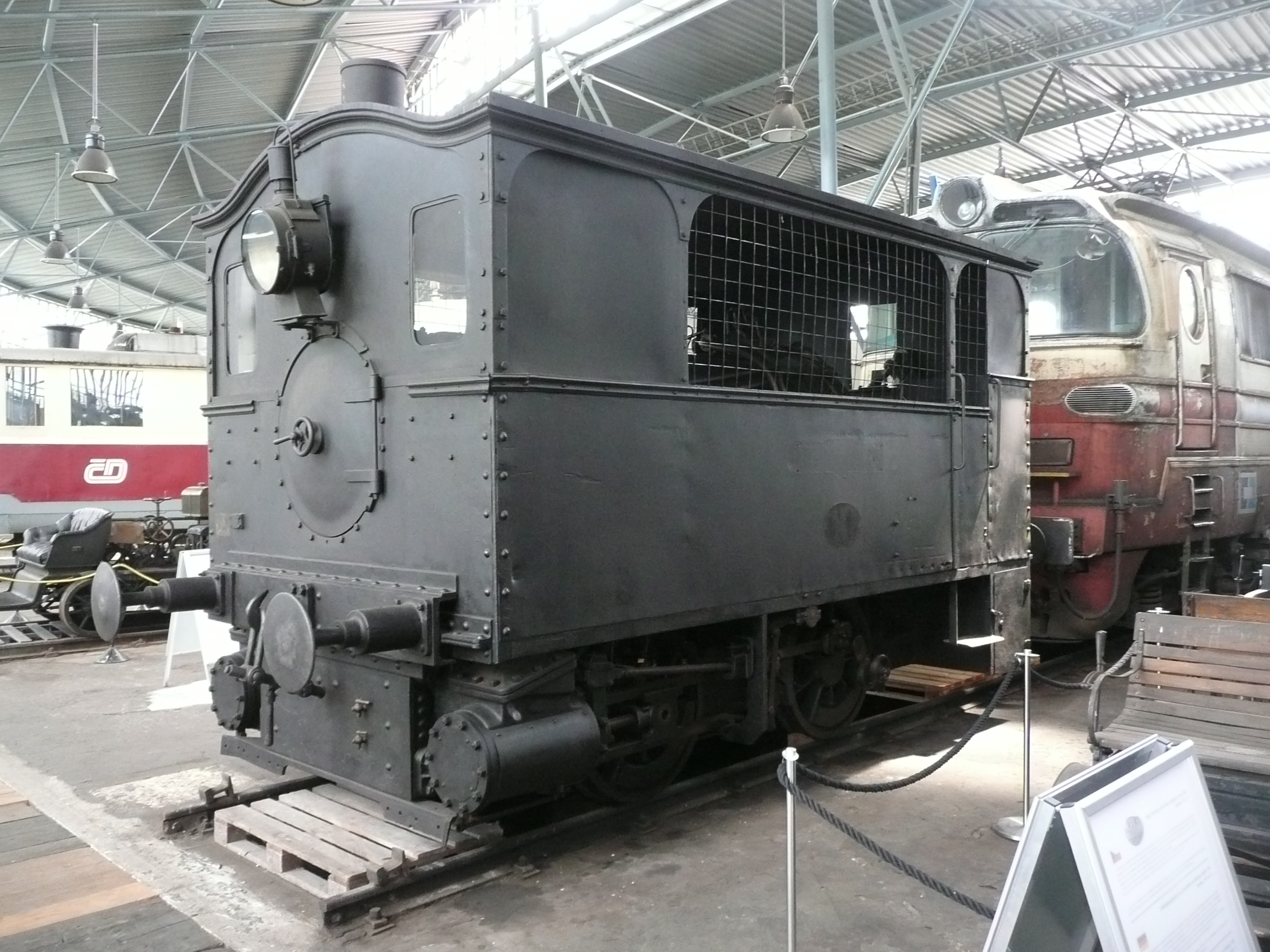 Strassendampflok "Gartenau" der ehemaligen Salzburger Eisenbahn- und Tramwaygesellschaft (SETG), ausgestellt im NTM Depot Chomutov